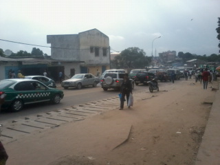 Le transport à Brazzaville